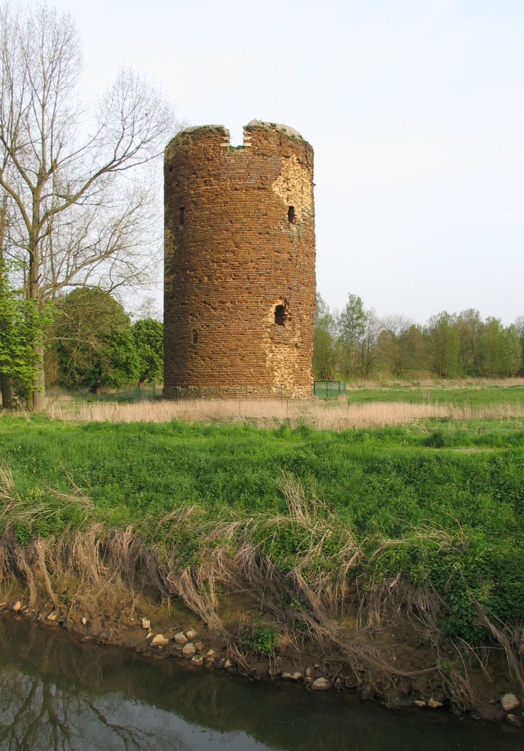 Maagdentoren in Zichem - eigen foto